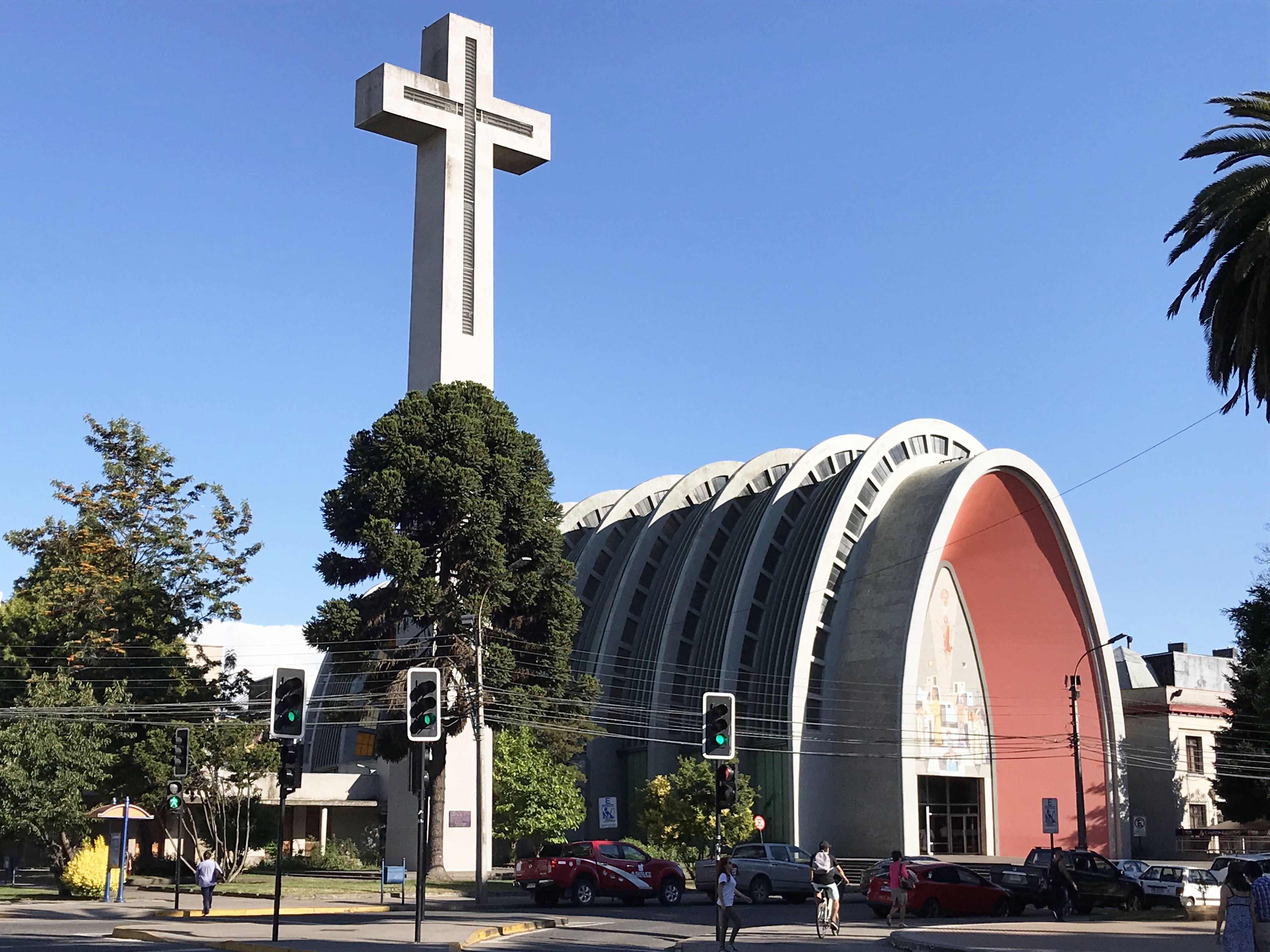 Catedral de Chillán sin las antenas de celulares. Diciembre de 2018.